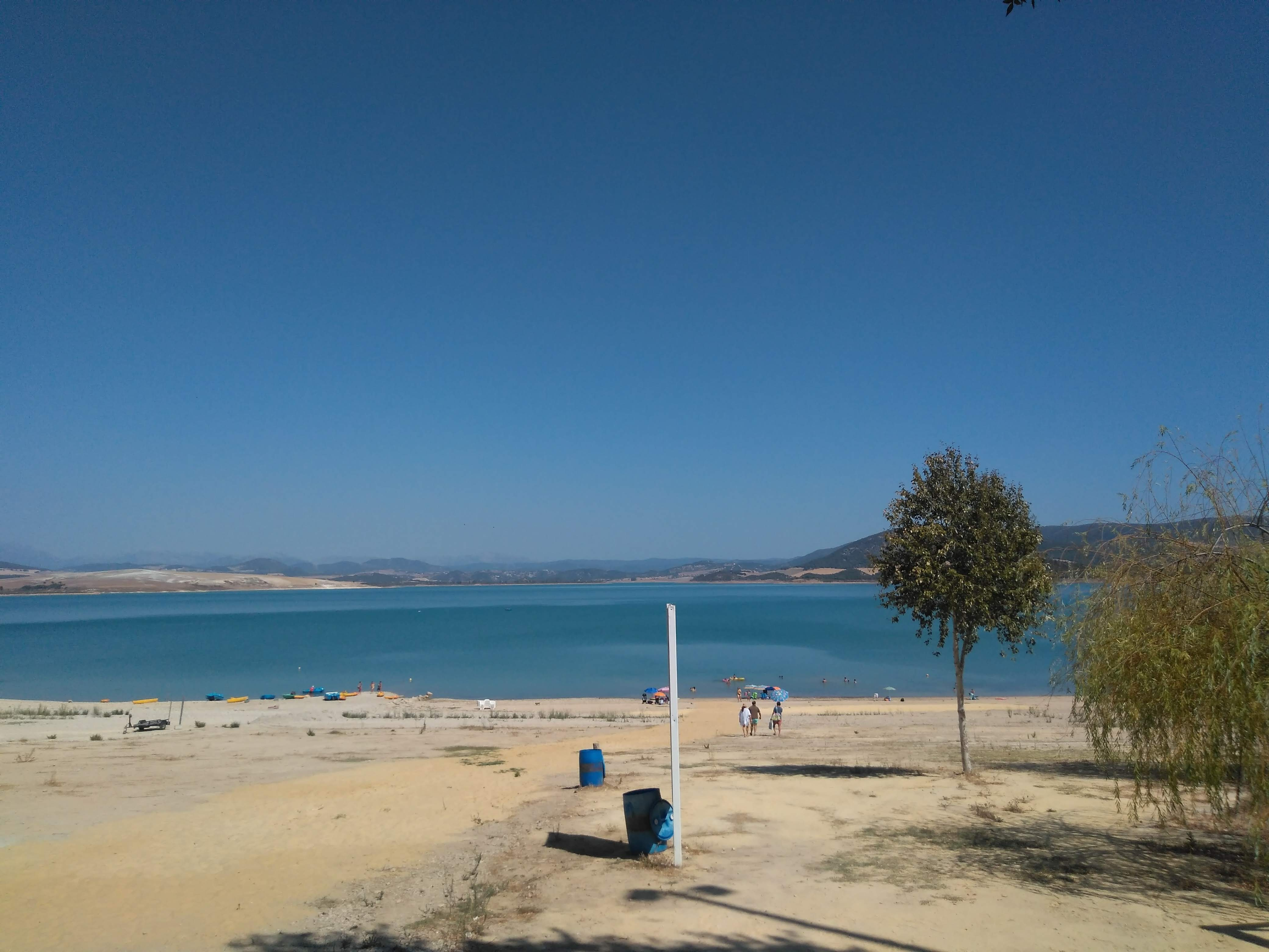 Playa del Camping San José del Valle - España